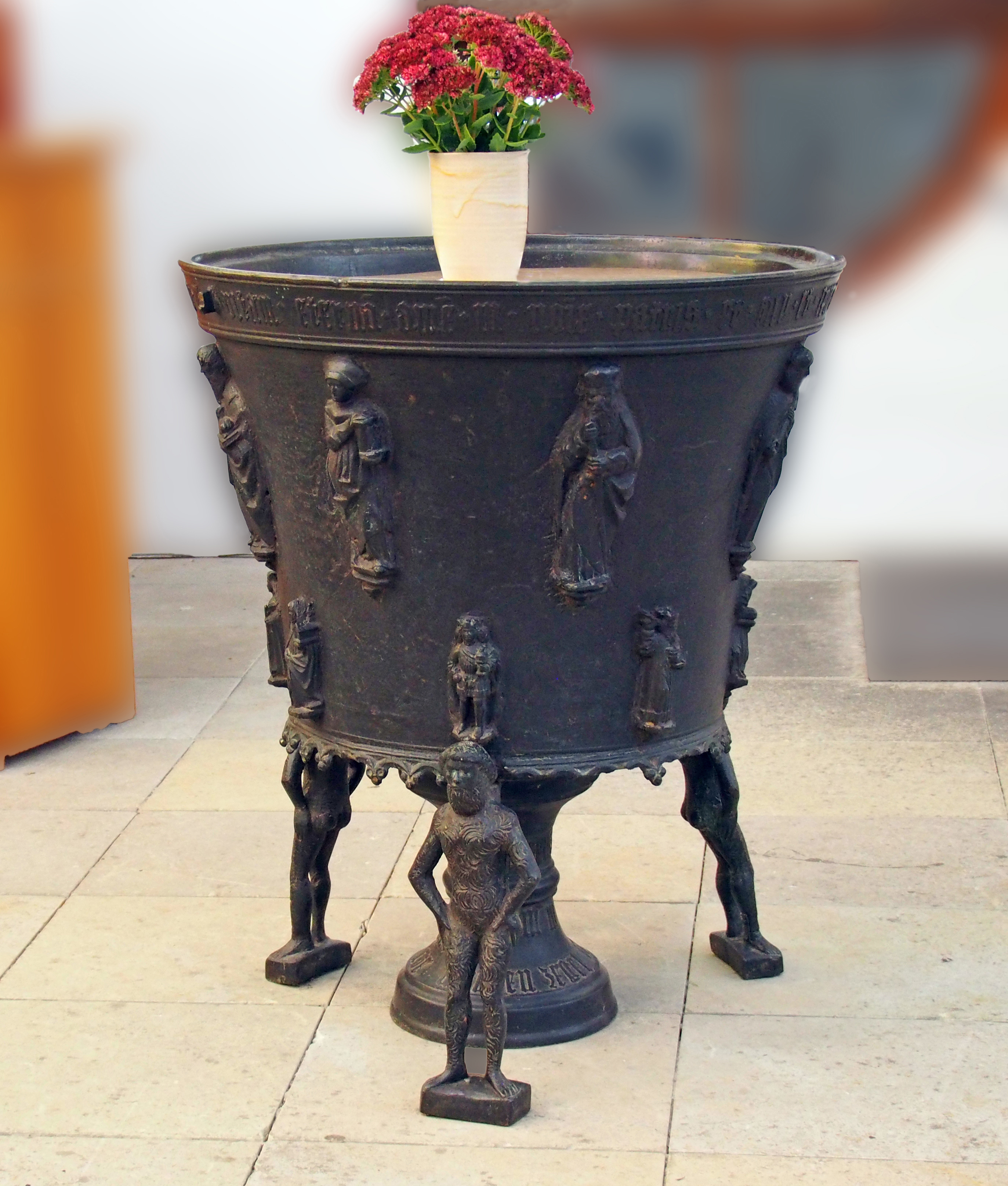 Tauffünte (Bronze) von 1512 in der Petrikirche Rostock